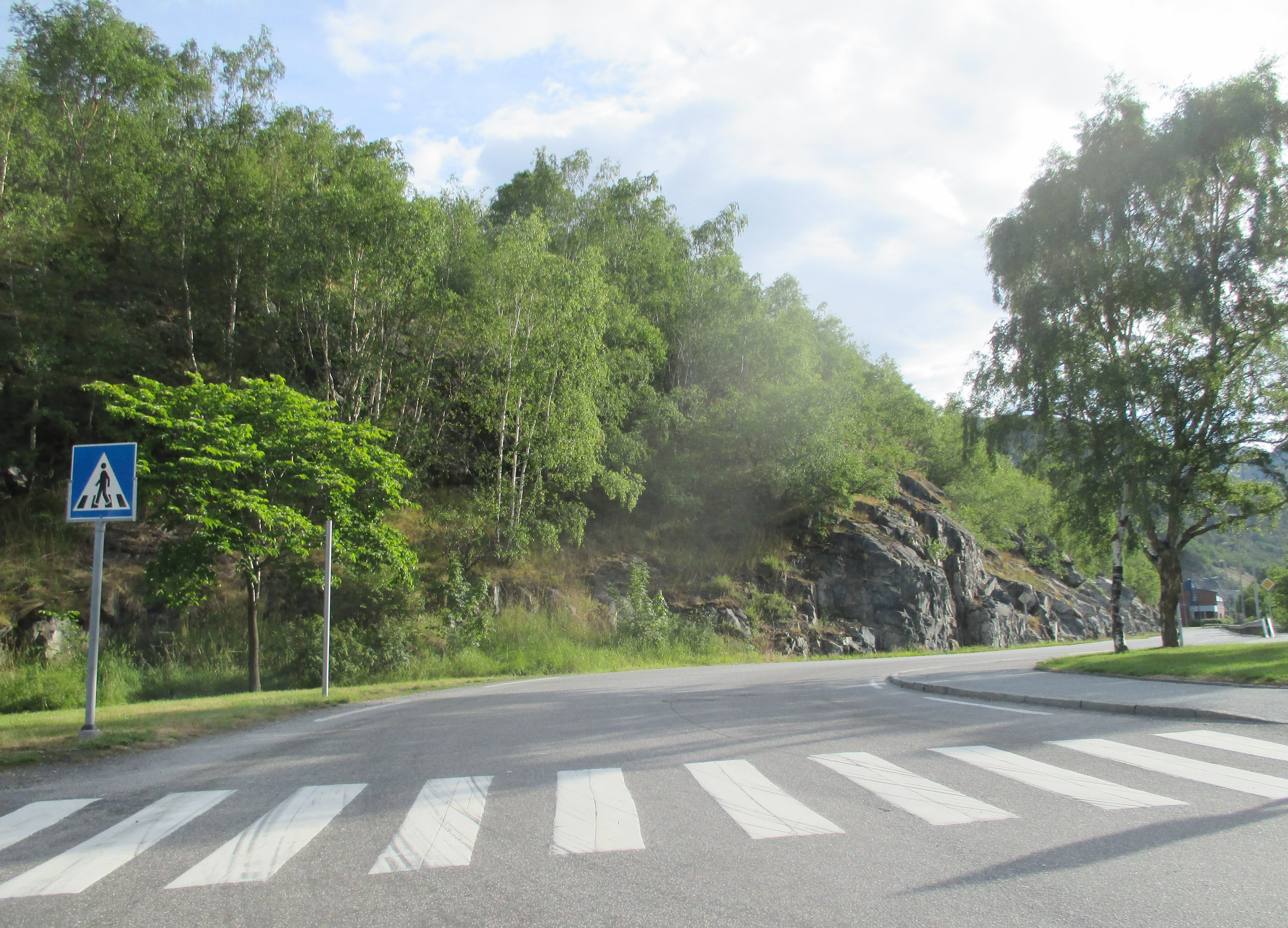 Utladalsvegen, i krysset med Storevegen